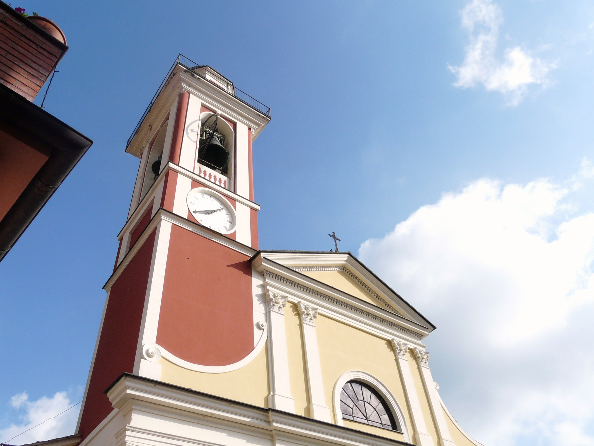 Chiesa di San Martino, Bargone, Liguria, Italia